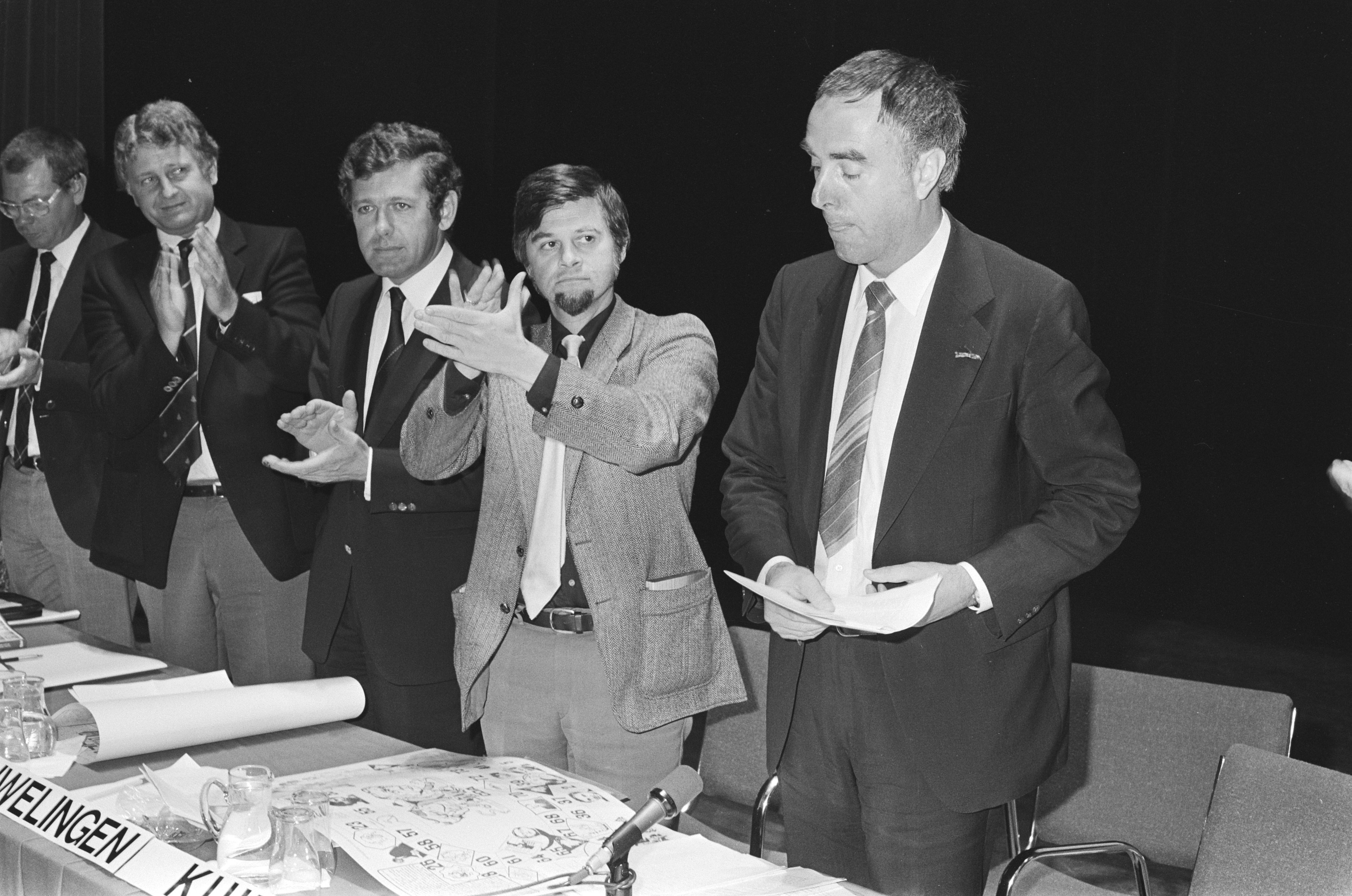 Collectie / Archief : Fotocollectie Anefo Reportage / Serie : Opdracht ARP; laatste vergadering van ARP i.v.m. opgaan in CDA Beschrijving : Applaus voor Hans de Boer (r), daarnaast v.l.n.r. Bukman, Van Houwelingen en Kuiper Annotatie : Opdracht ARP Datum : 27 september 1980 Locatie : Amsterdam, Noord-Holland Trefwoorden : politieke partijen, vergaderingen Persoonsnaam : Boer, Hans de, Bukman, Piet, Houwelingen, Jan van, Kuiper, D.Th. Instellingsnaam : ARP Fotograaf : Antonisse, Marcel / Anefo Auteursrechthebbende : Nationaal Archief Materiaalsoort : Negatief (zwart/wit) Nummer archiefinventaris : bekijk toegang 2.24.01.05 Bestanddeelnummer : 931-0465